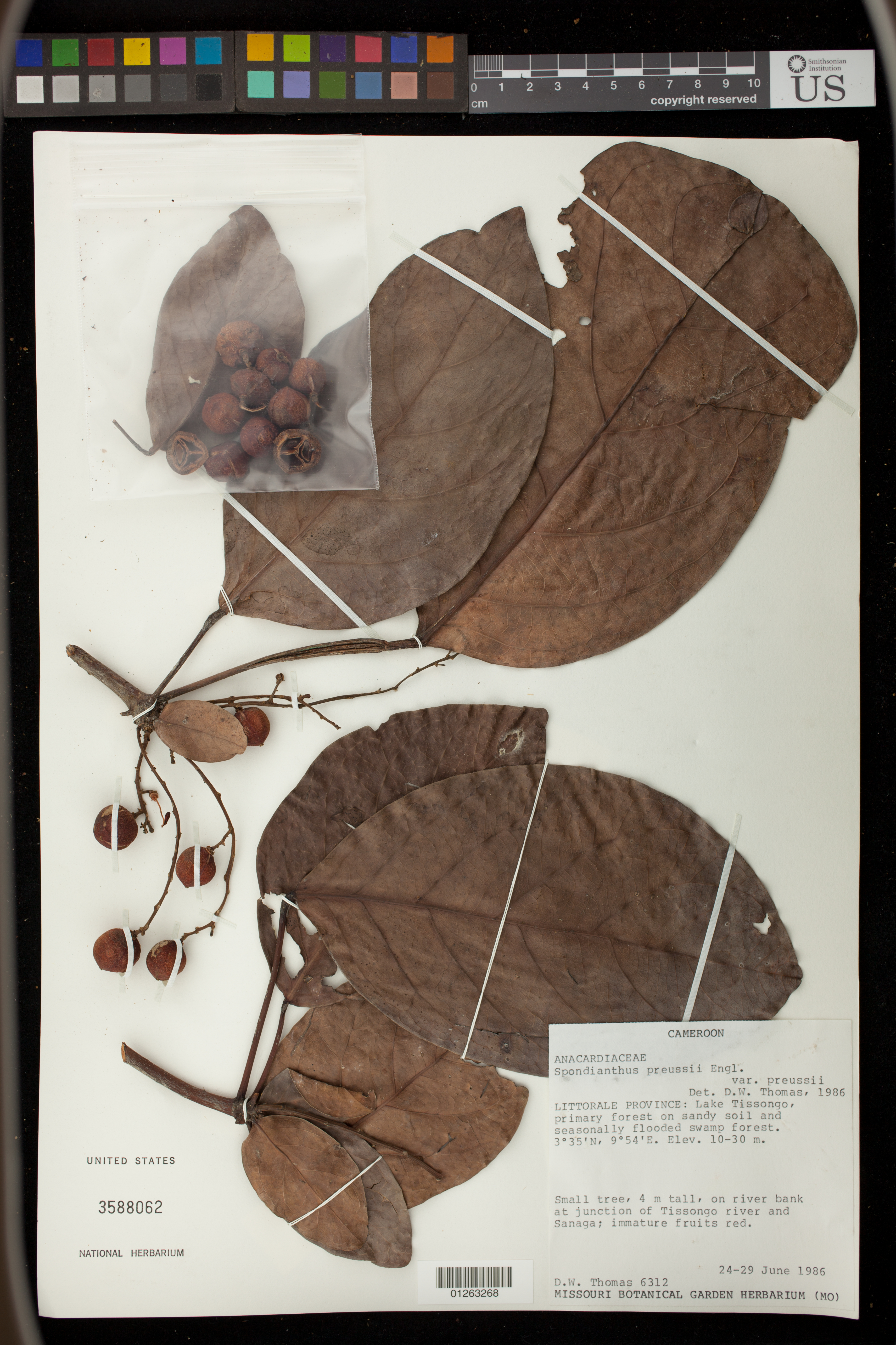 Spondianthus preussii Object Details Biogeographical Region 23 - West-Central Tropical Africa Collector Duncan W. Thomas Max. Elevation 36 Min. Elevation 10 Crowdsourcing Transcribed by digital volunteers Record Last Modified 8 Sep 2016 Specimen Count 1 Collection Date 24 Jun 1986 to 29 Jun 1986 Barcode 01263268 USNM Number 3588062 Place Littorale Province: Lake Tissongo, Littoral, Cameroon, Africa Published Name Spondianthus preussii Taxonomy Plantae Dicotyledonae Euphorbiales Euphorbiaceae (phyllanthaceae) NMNH - Botany Dept. Record ID nmnhbotany_11496219 Usage of Metadata (Object Detail Text) CC0 GUID (Link to Original Record)